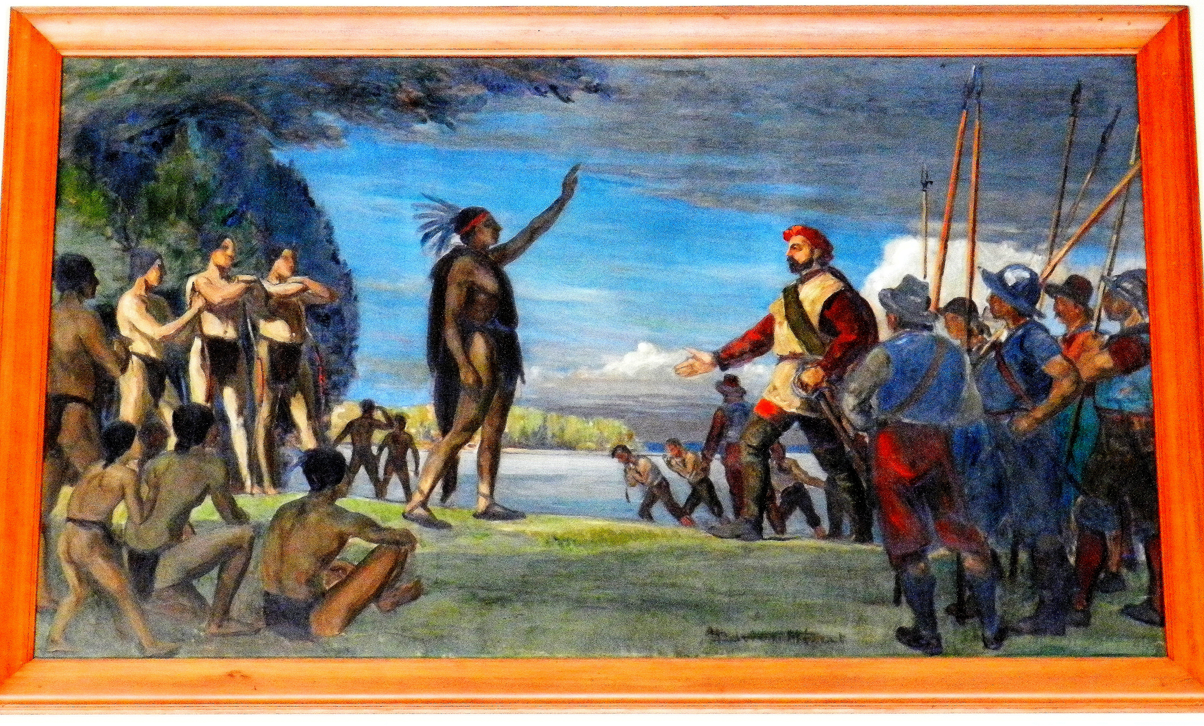 Jacques Cartier atterrit à Hochelaga en 1535